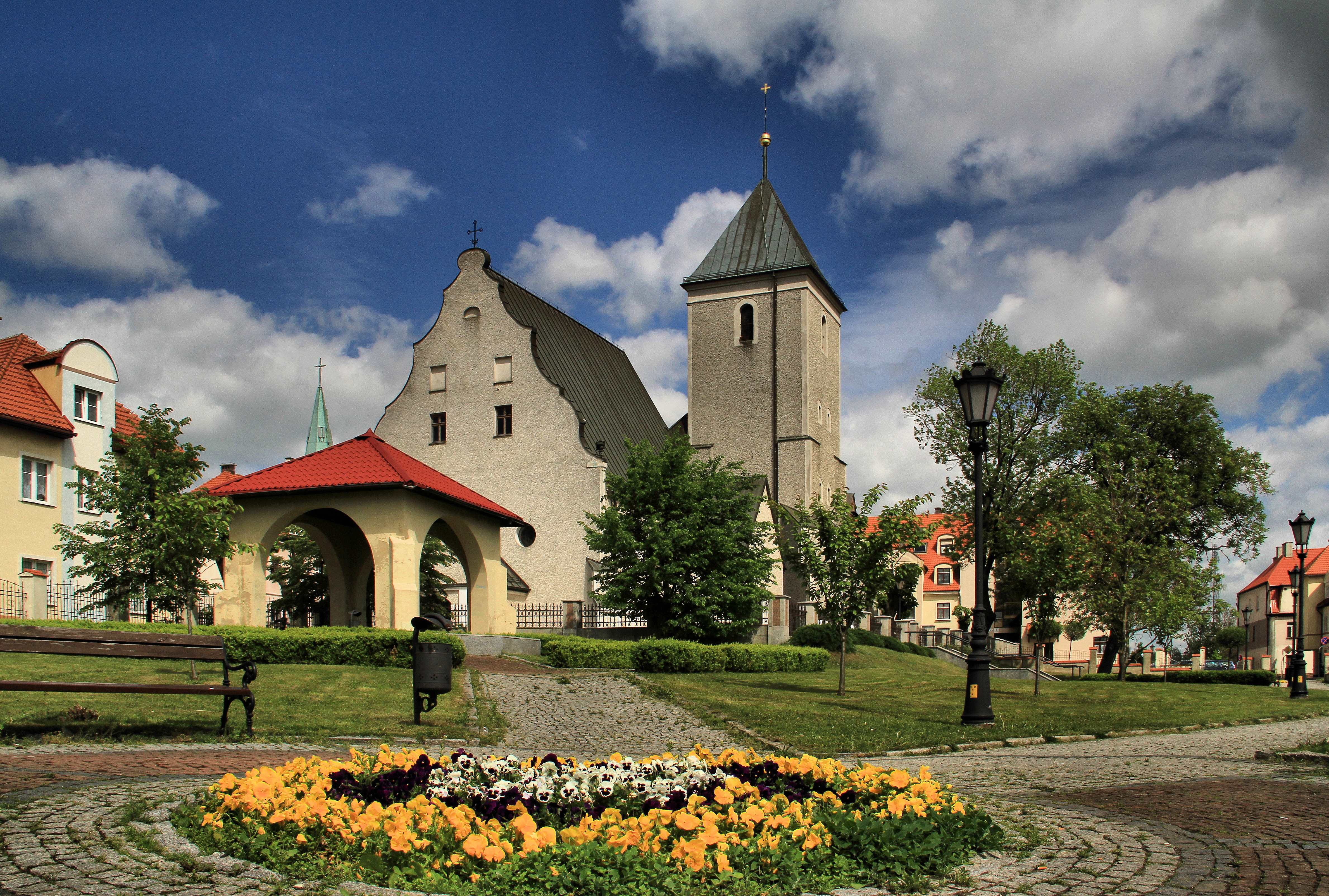 Kościół parafialny św. Michała Archanioła Polkowice, pl. Kościelny 1, Polkowice